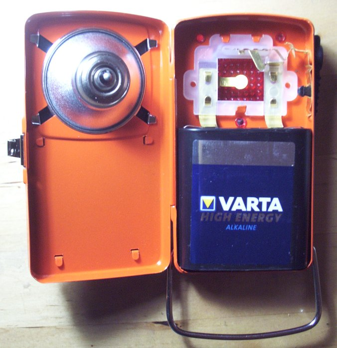 geöffnete Crone Kastenleuchte (Herstellung 2008), mit 4,5 V Flachbatterie